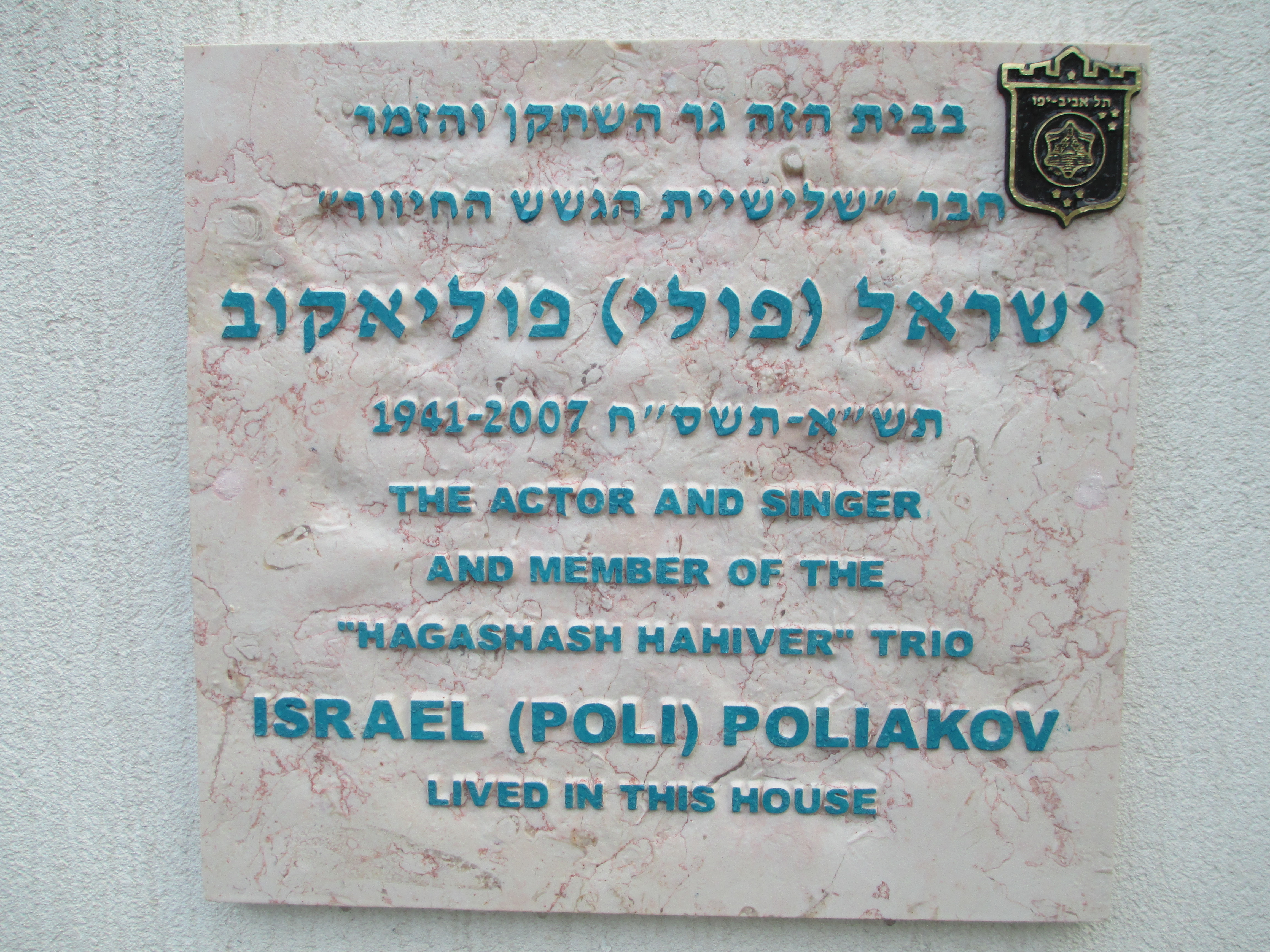 לוחית זיכרון לישראל פוליאקוב בכניסה לביתו ברח' בית חורון 4 בתל אביב